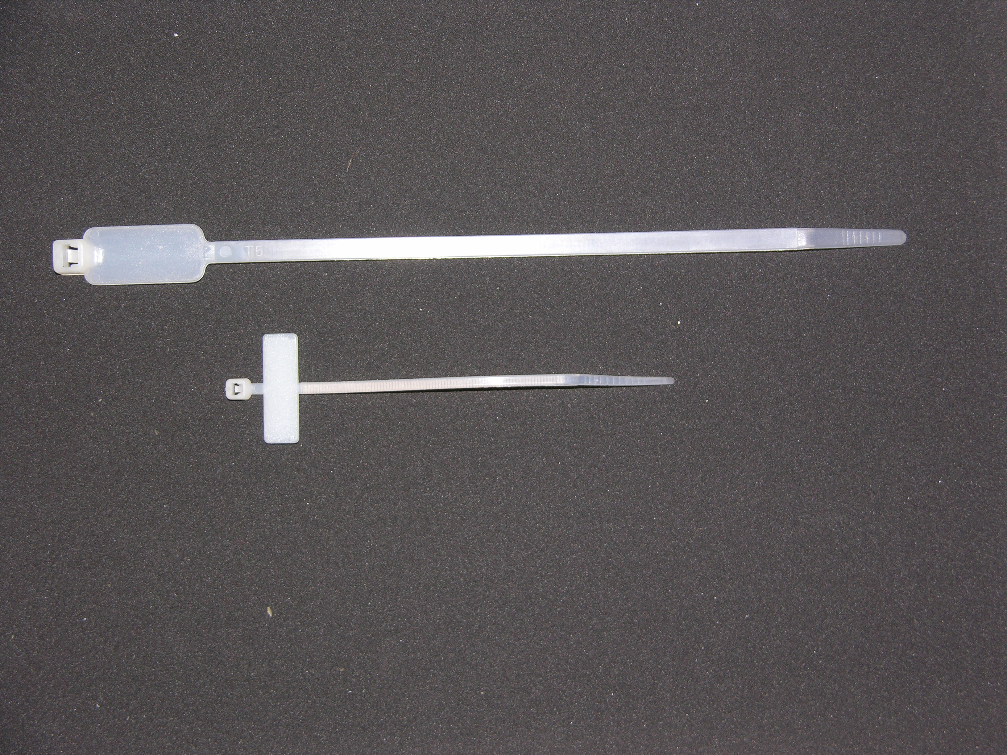 Kabelbinder zu Beschriftungszwecken